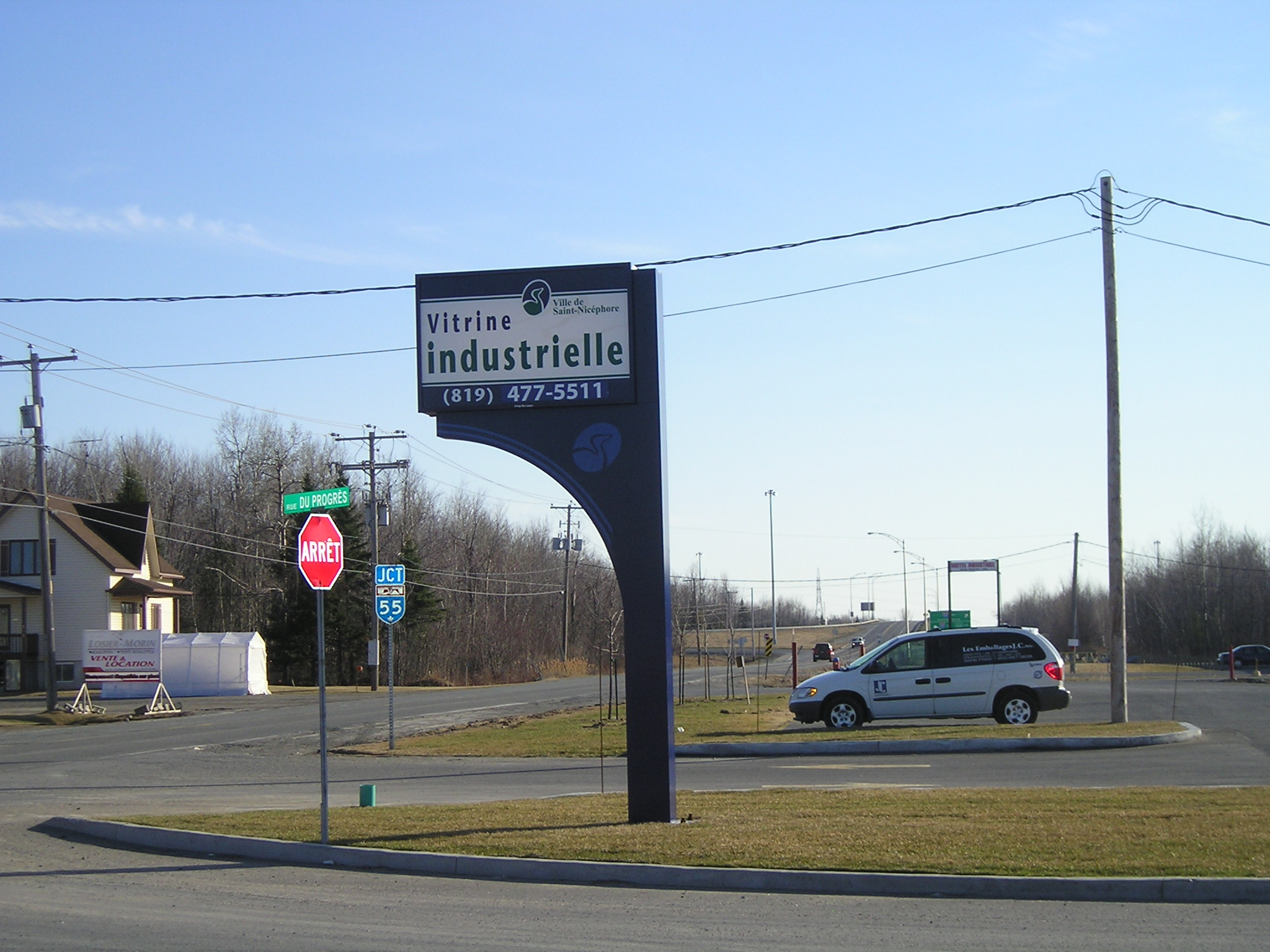 Panneau indiquant le Parc Industrielle de la Ville de Saint-Nicéphore près de l'autoroute 55. Le panneau est situé sur la route 139